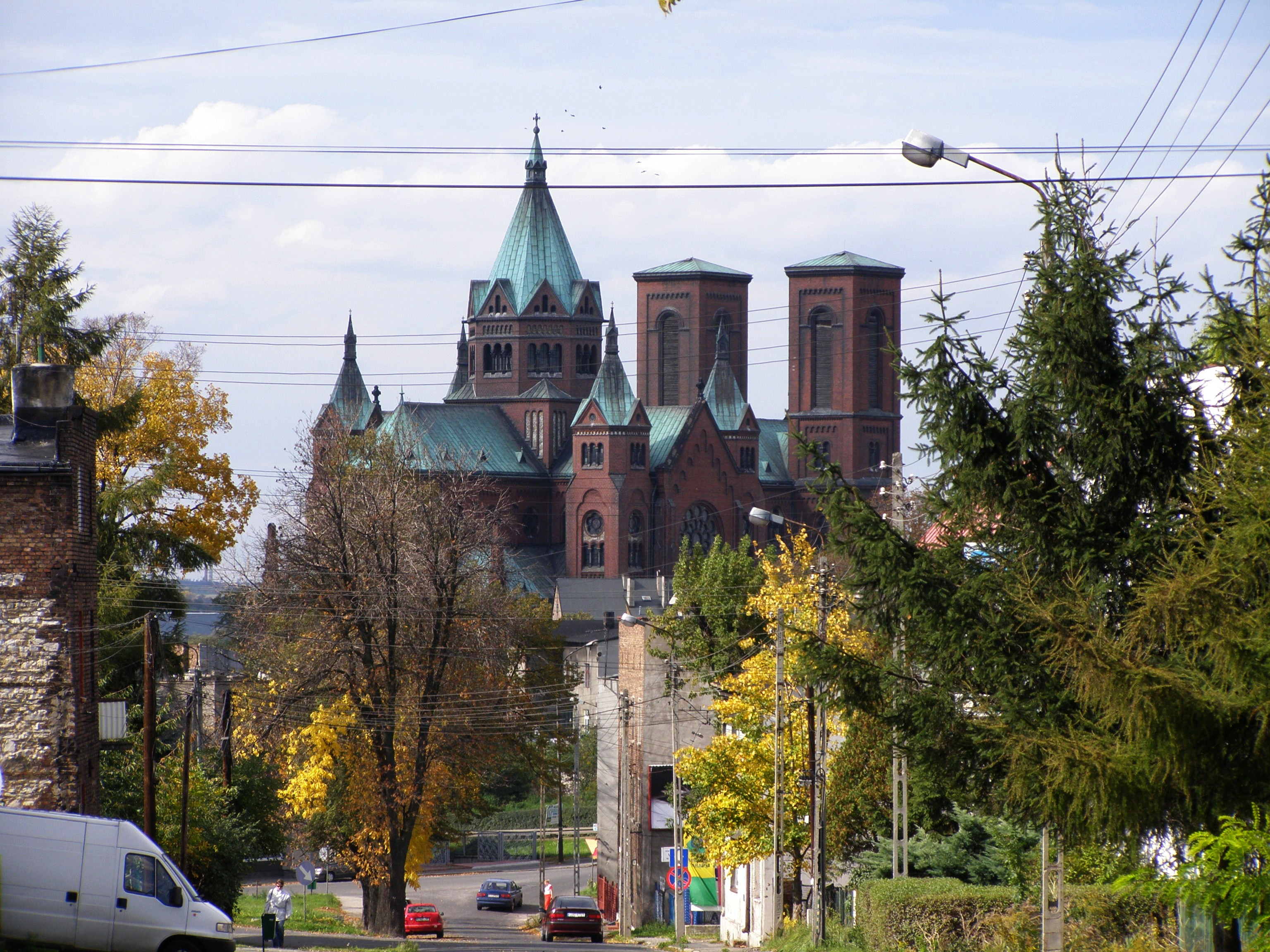 Neoromański kościół Św. Stanisława Biskupa i Męczennika